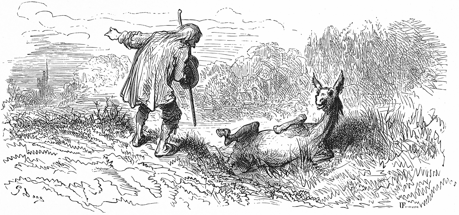 grafika z książki PL Bajki, Jean de La Fontaine, nakładem i drukiem Jana Noskowskiego, Warszawa 1876